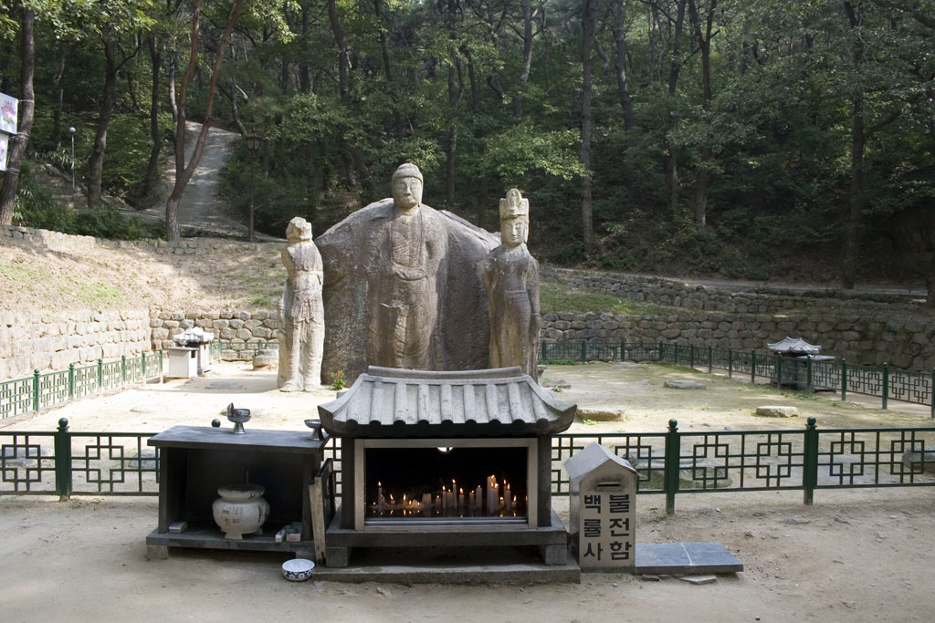 Korea Gyeongju 20061020 IMG_9160